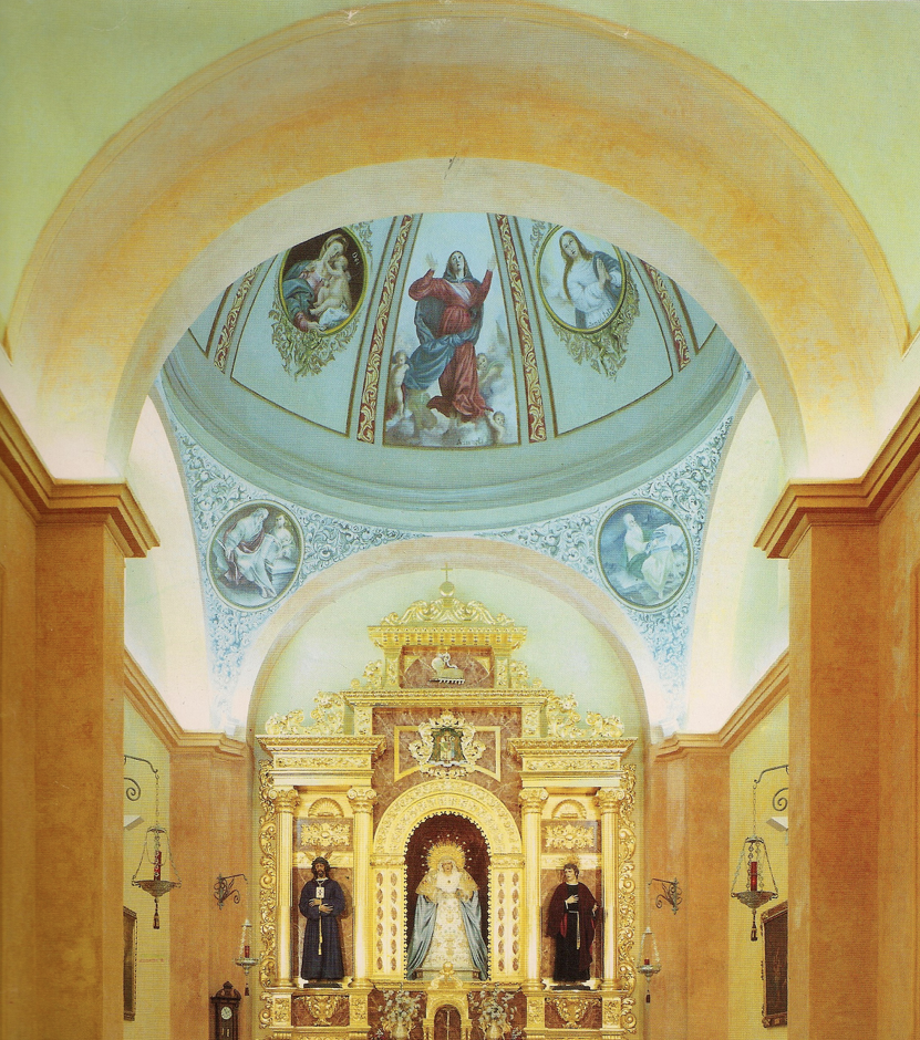 Juan Ruiz Miralles pintó la Capilla del sagrario de la Catedral de la Encarnación de Almería.